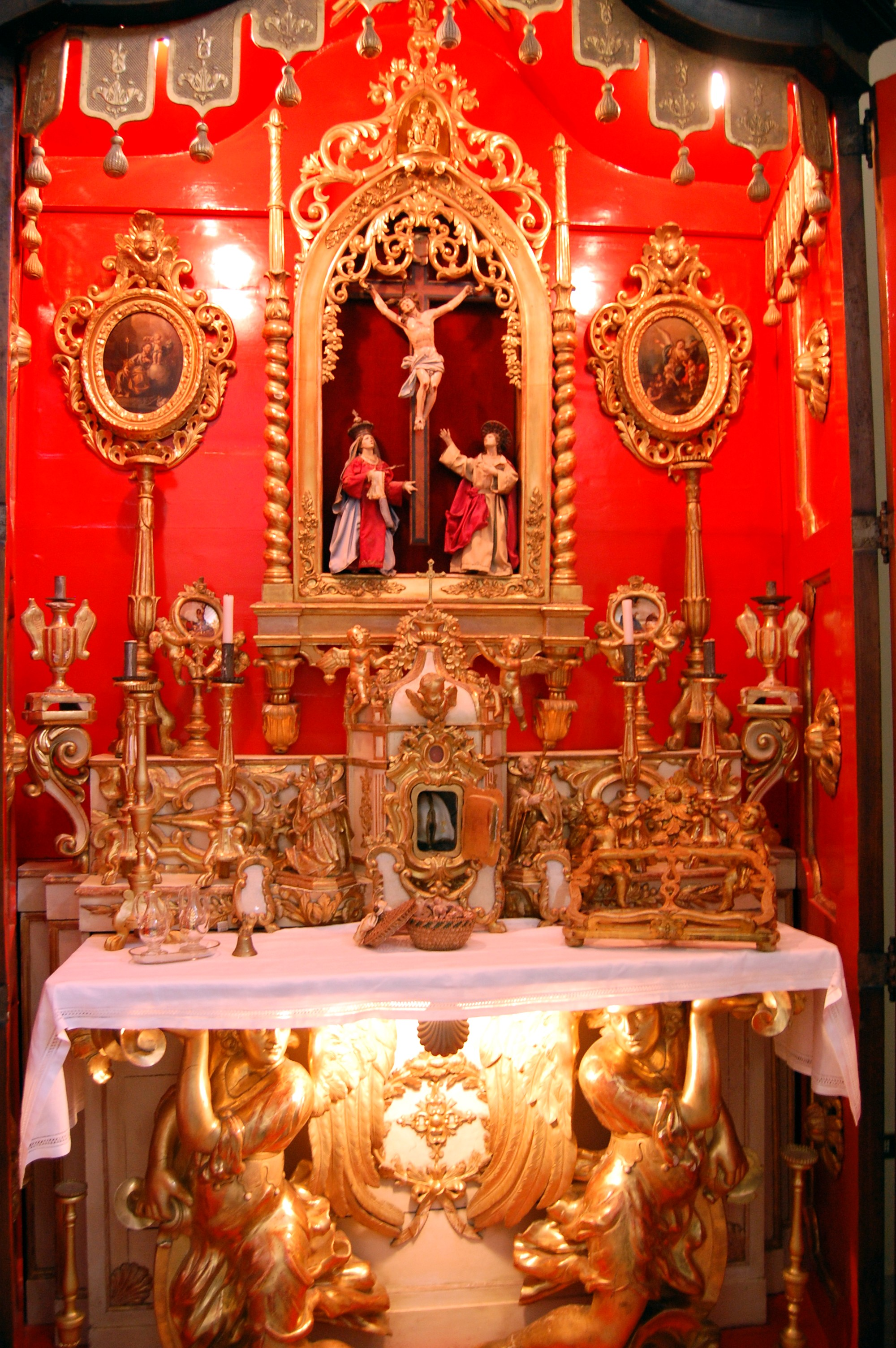 Museo Diocesano di Lucera: altare privato.